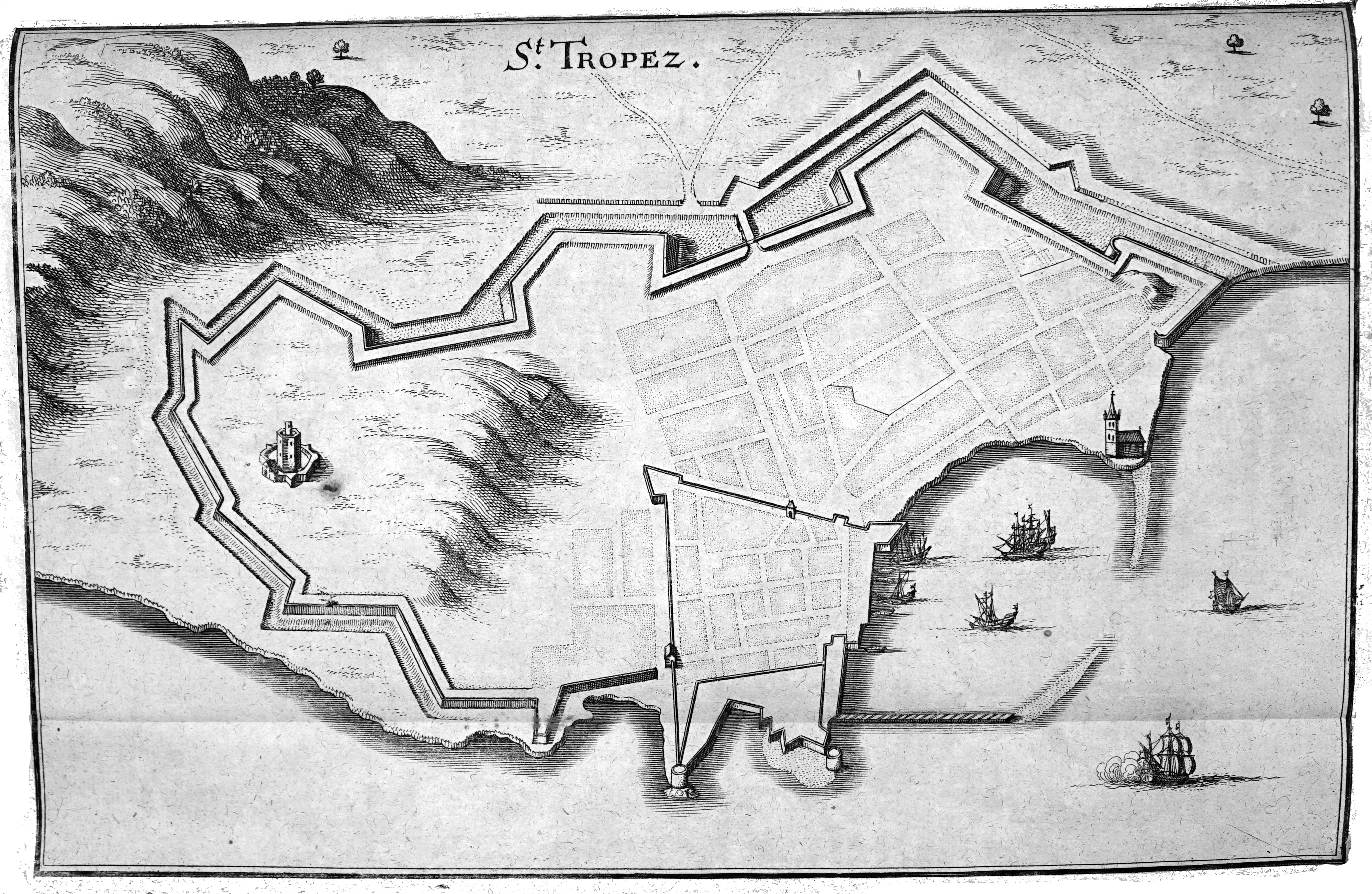 extrait de "topographia galliae".